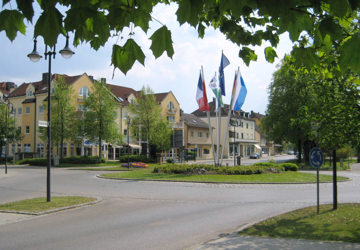 Dies ist ein zentraler Platz mit Kreisverkehr, neben der Grünanlage "Auf der Insel" im Ortszentrum von Olching.